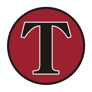 Емблемата на Торпедо/ДСО Енергия